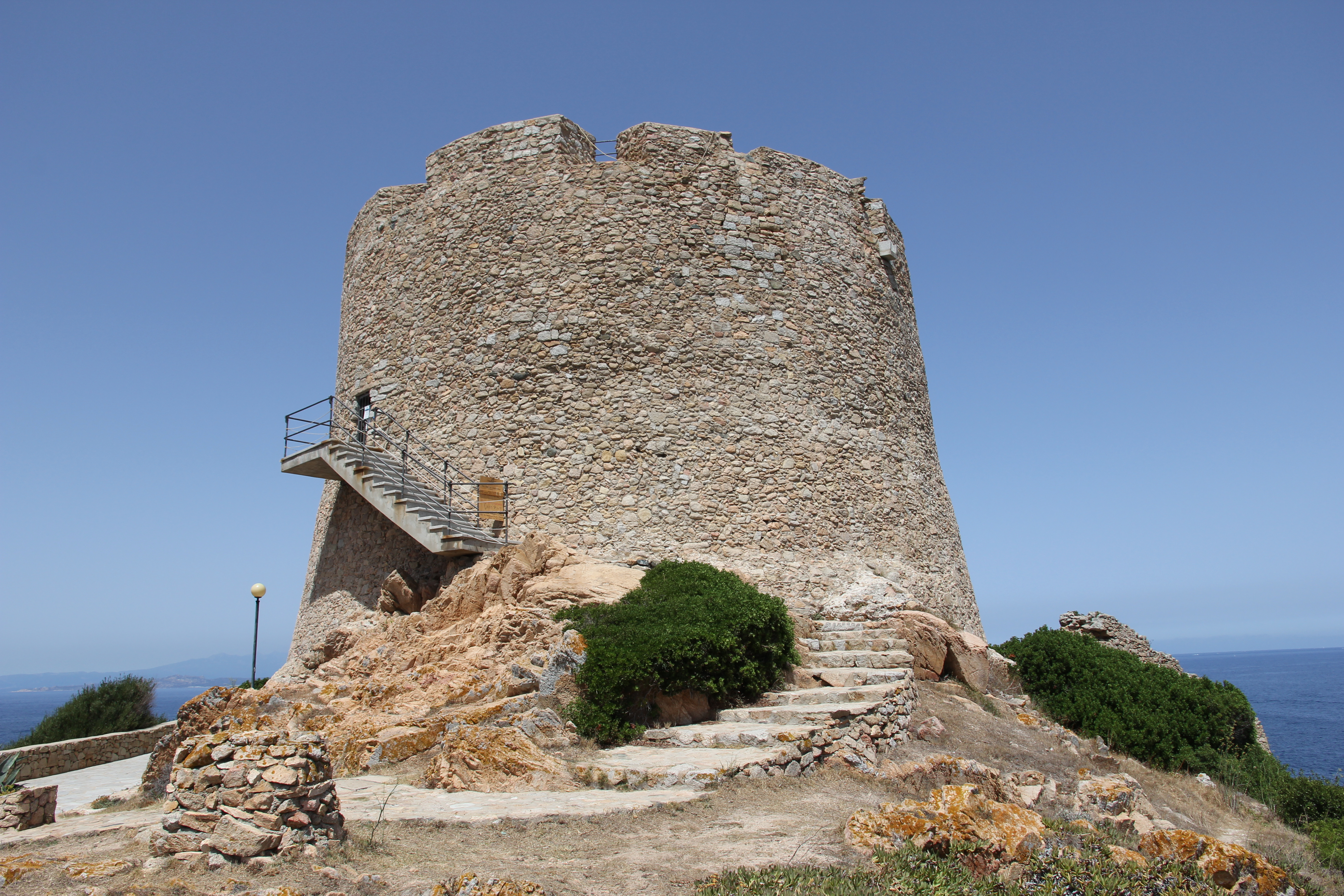 Santa Teresa Gallura - Torre di Longonsardo